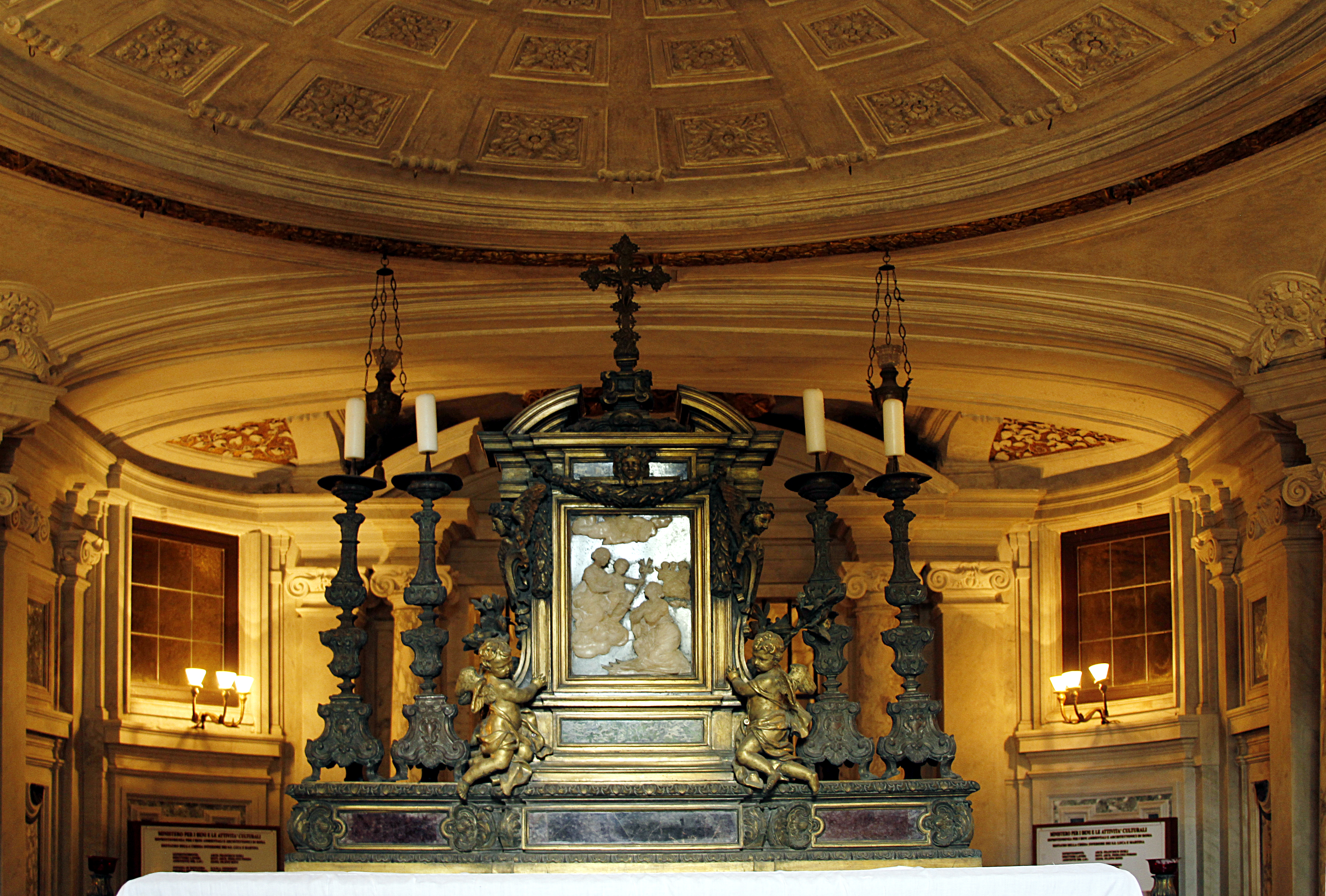 Crypt of Santi Luca e Martina - Rome